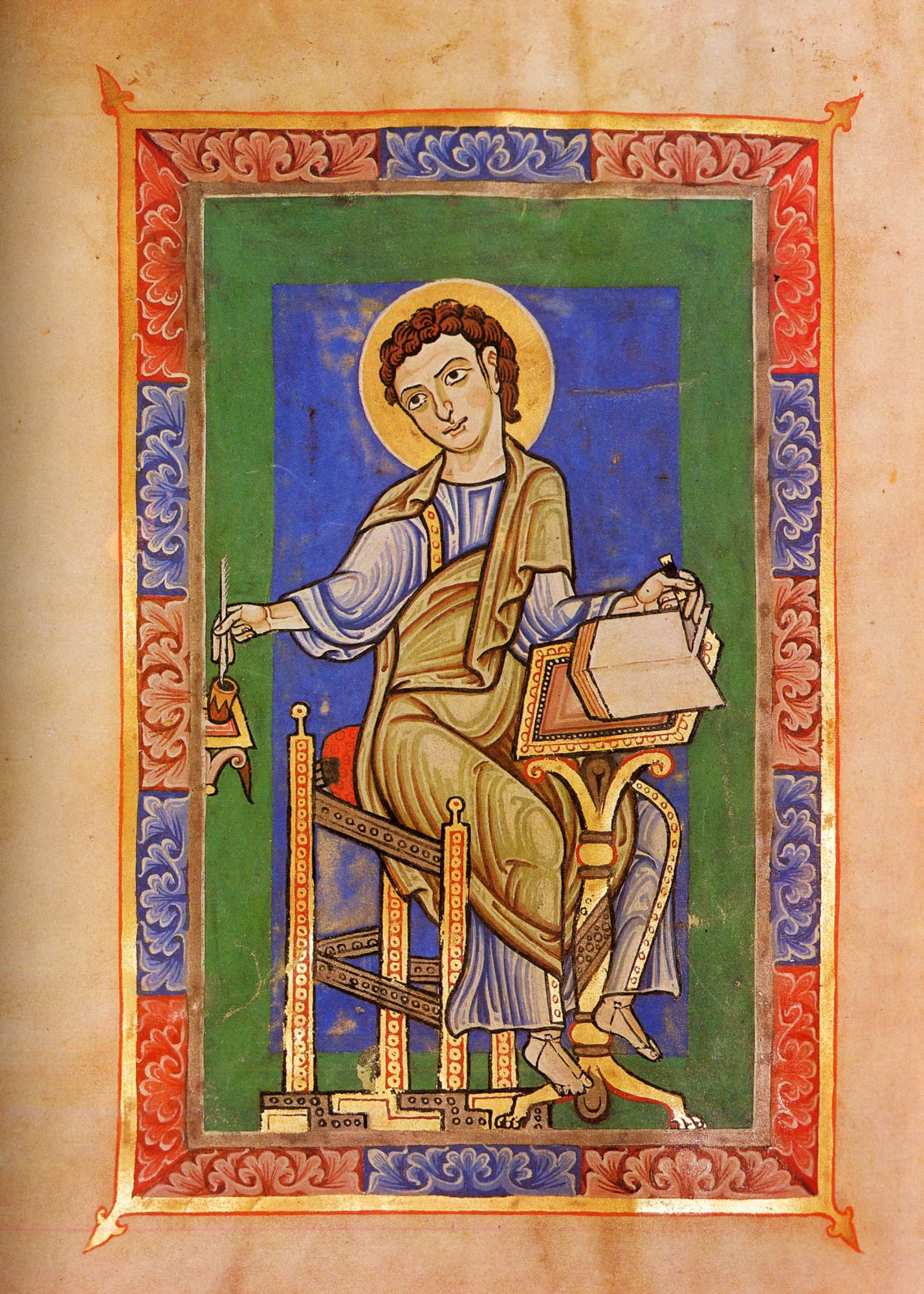 Evangelistenbild aus dem Evangeliar HAStK, Chroniken und Darstellungen (Best. 7030), W 312a. In: Anton Legner (Hrsg.), Ornamenta Ecclesiae. Kunst und Künstler der Romanik in Köln II (1985) 294